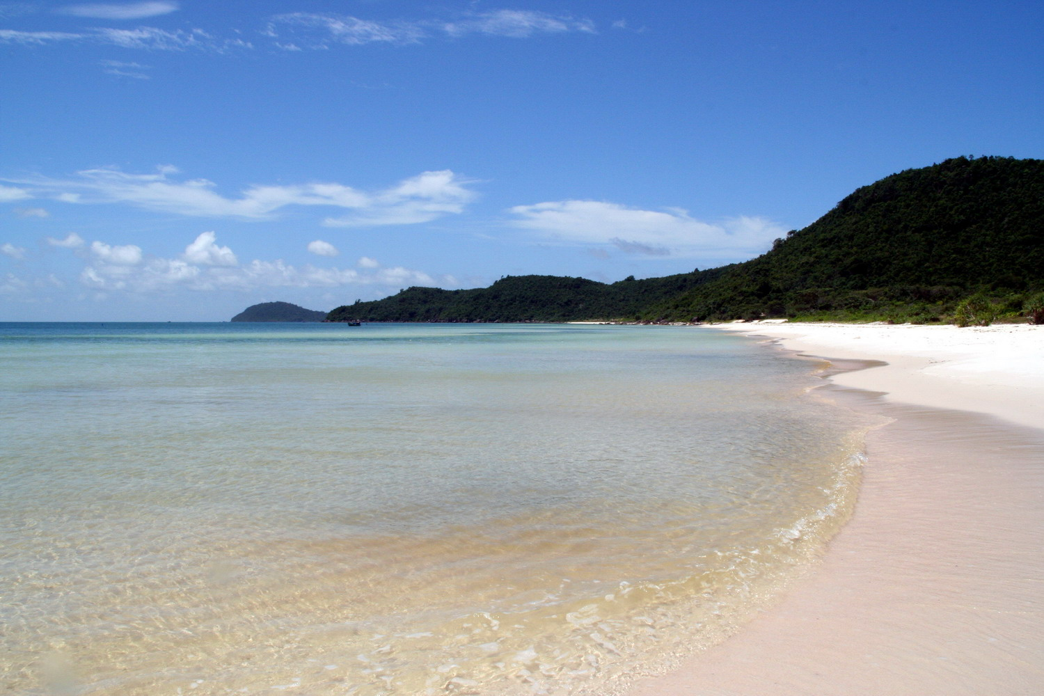 La plage Sao, Phu Quoc